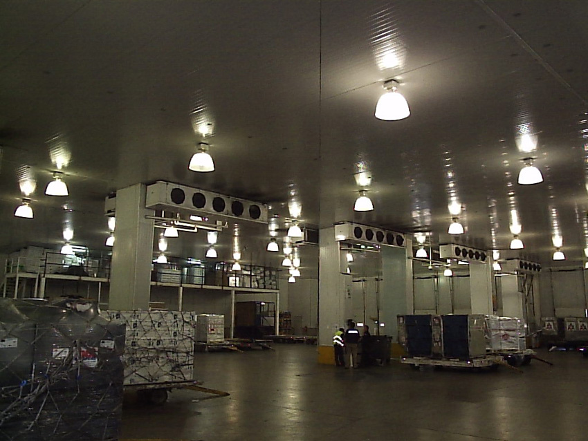 Sala Recepción de Planta frigorífica. Evaporadores de expansión seca para R22